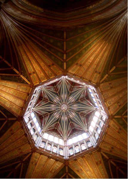 Das Oktogon in der Kathedrale von Ely